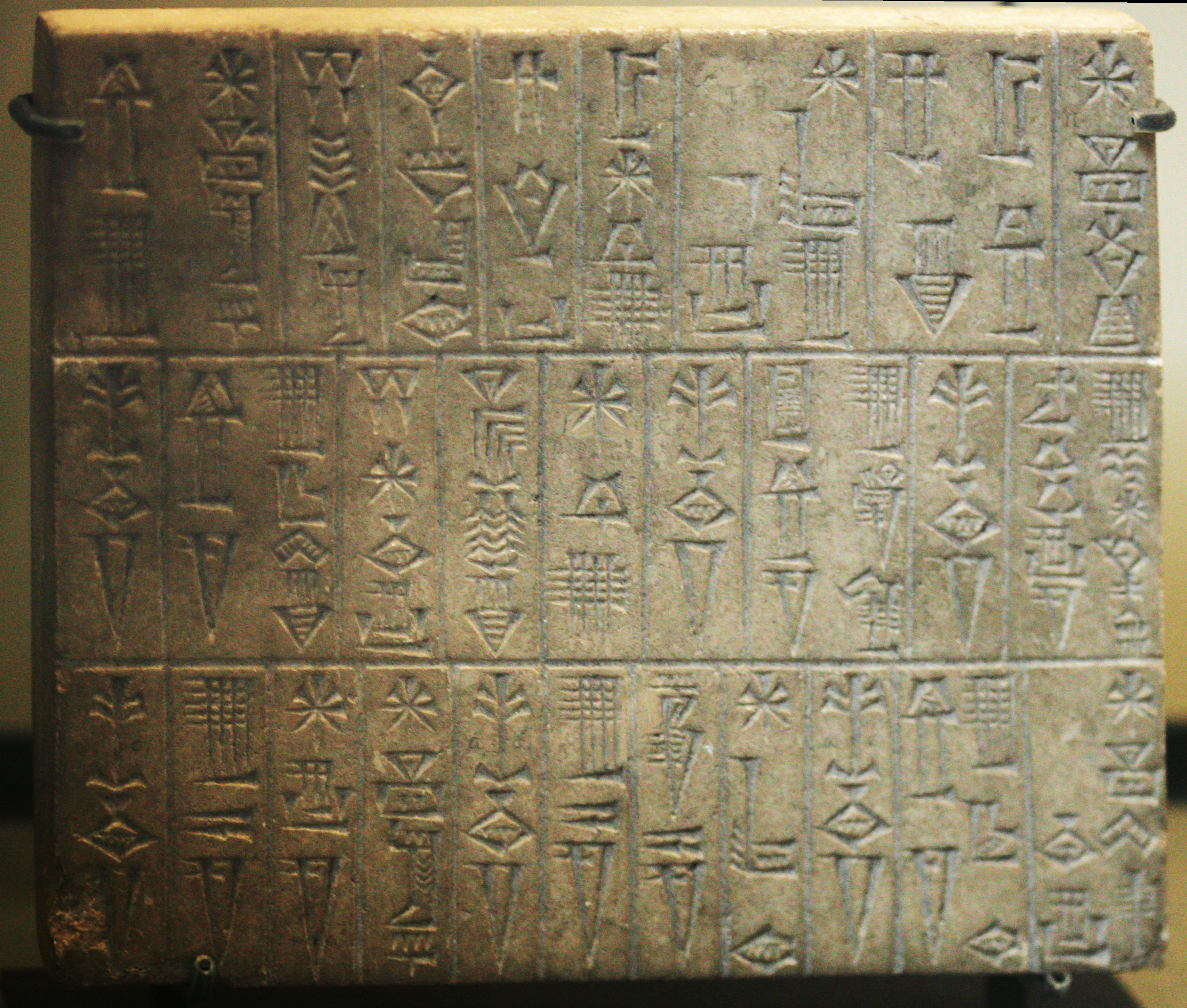 ArtistUnknownDescription Tablette d'Ur-Ba'u, prince de Lagash. Énumération des temples construits par le prince. Vers 2130 avant J.-C. DimensionsH. : 21 cm. ; L. : 18 cm. ; Pr. : 3 cm.Current location (Inventory)Louvre Museum Native nameMusée du LouvreLocationParisCoordinates48° 51′ 37″ N, 2° 20′ 15″ E Established1793Website control : Q19675 VIAF: 257711507 ISNI: 0000 0001 2260 177X ULAN: 500125189 LCCN: n80020283 NLA: 35912436 WorldCat Accession numberAO 261 ReferencesLouvre.frSource/PhotographerRamaOther versions Tablette d'Ur-Ba'u, prince de Lagash. Énumération des temples construits par le prince. Vers 2130 avant J.-C.